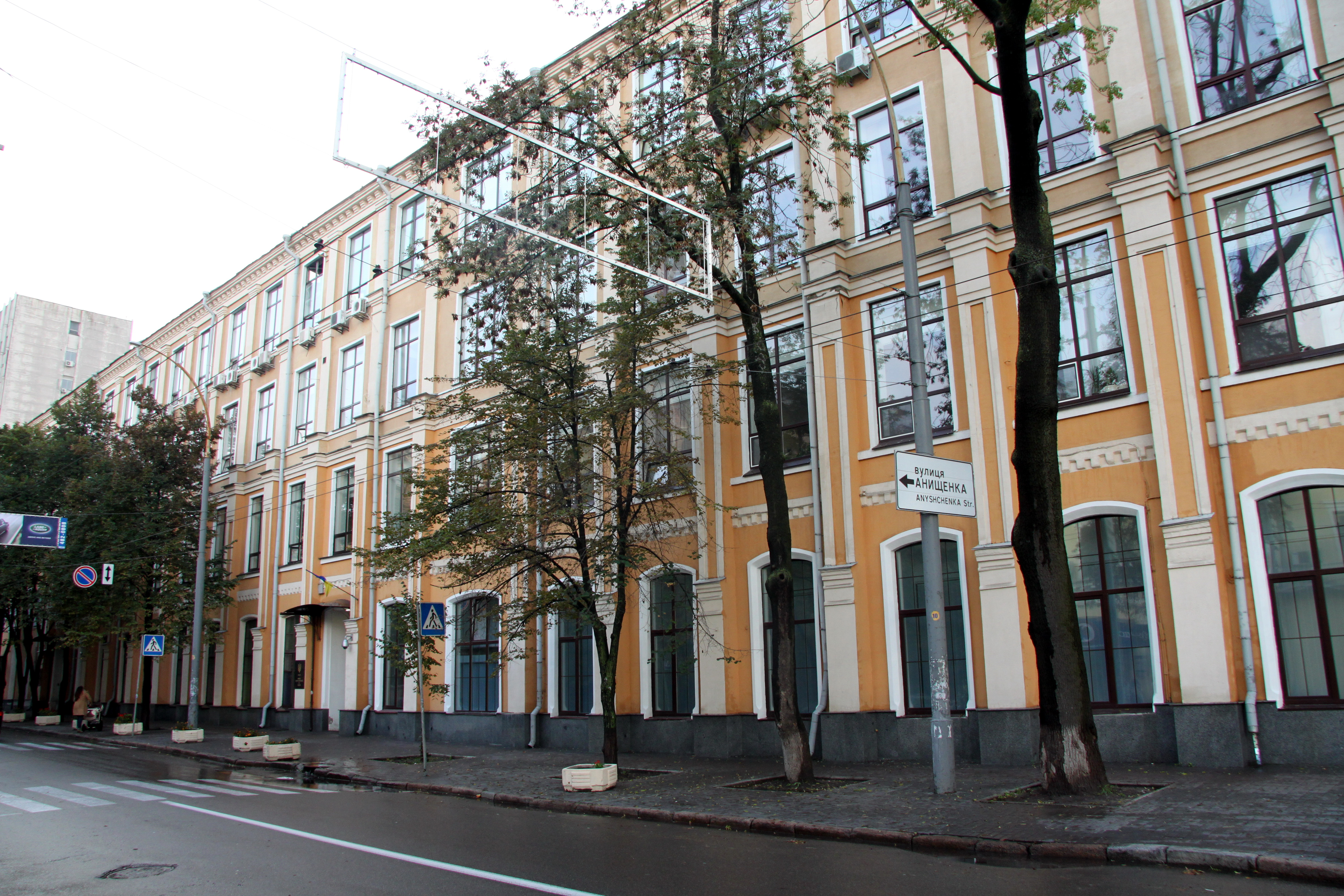 Казарма жандармського полку, Київ, Московська вул., 8